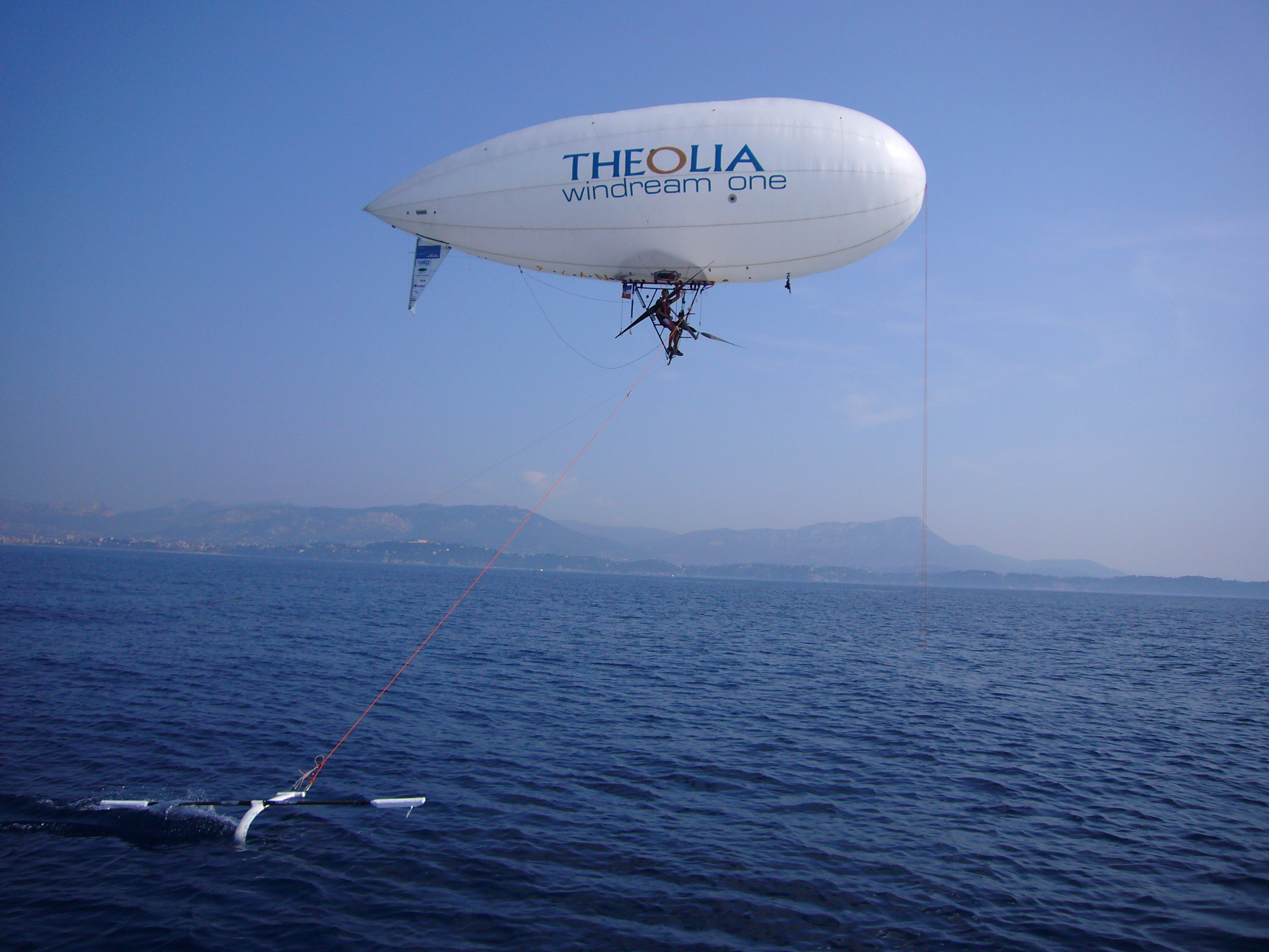 Le voilier des airs Aérosail à Toulon piloté par Stephane Belgrand Rousson relié au foil Chien de mer de Didier Costes .